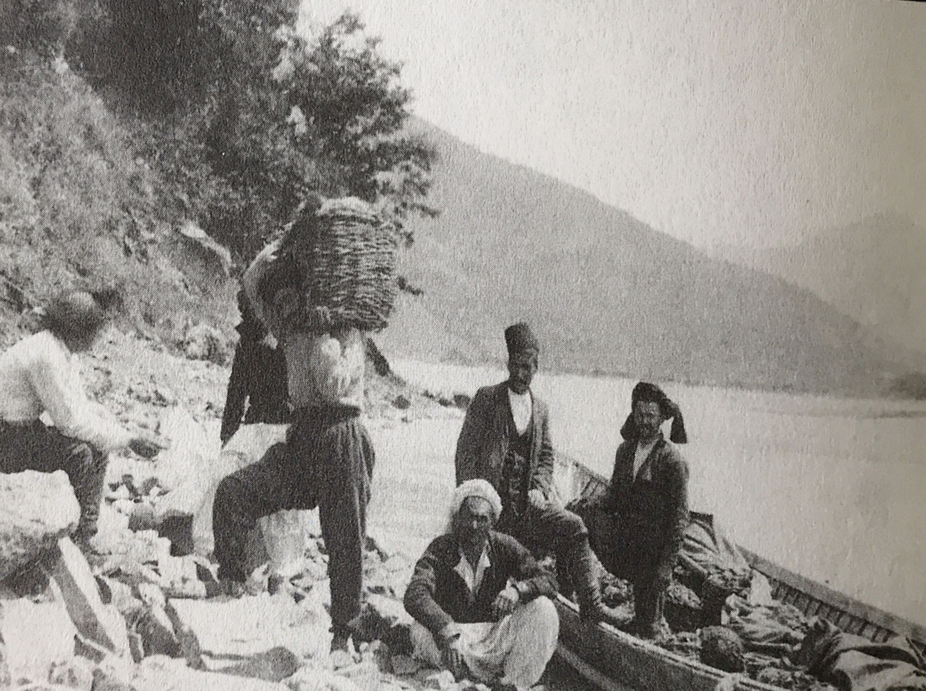 Çoruh kıyısında meyve taşıyan Lazlar